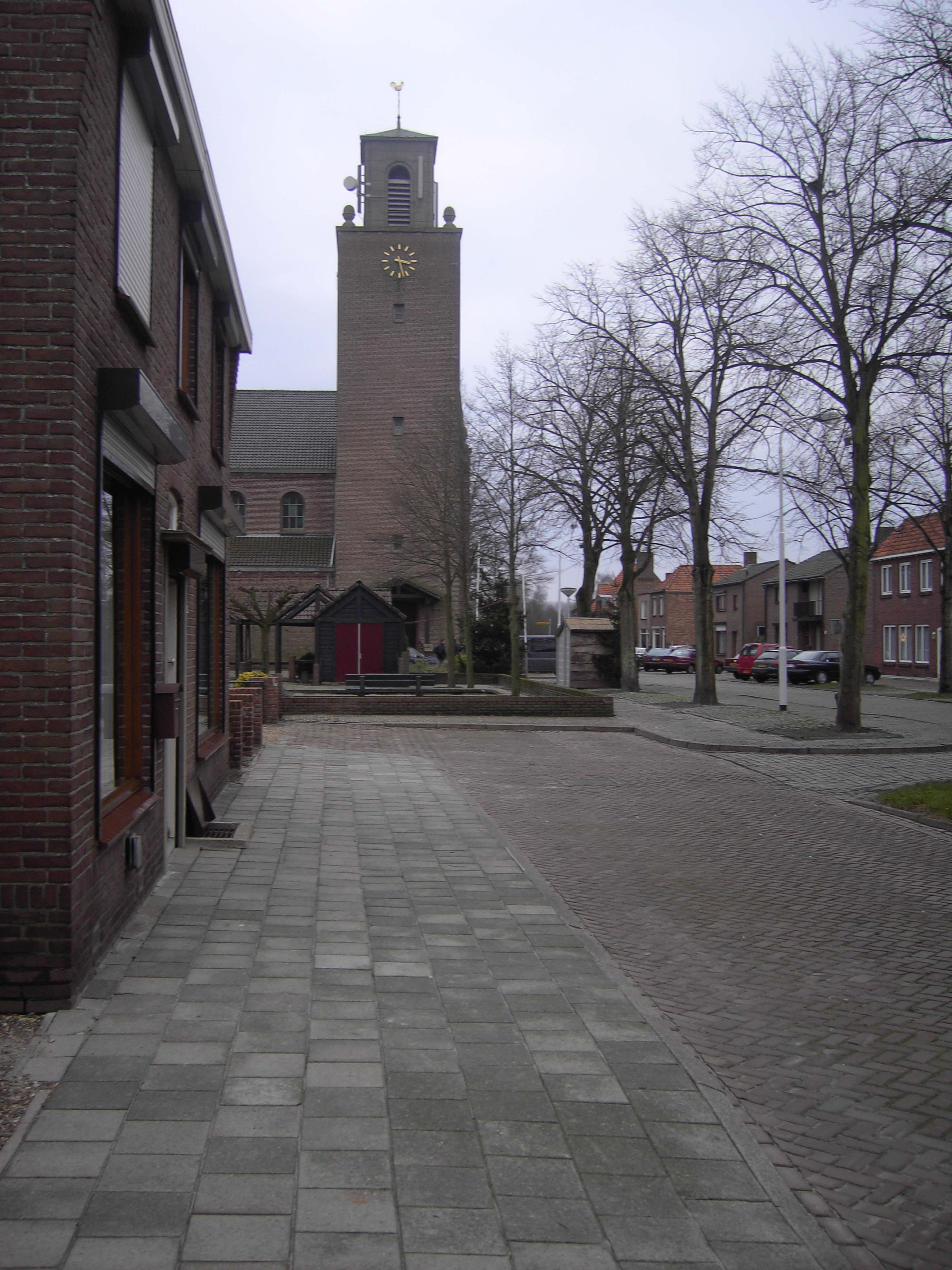 Eede - Sluis - Nederland - Kerk